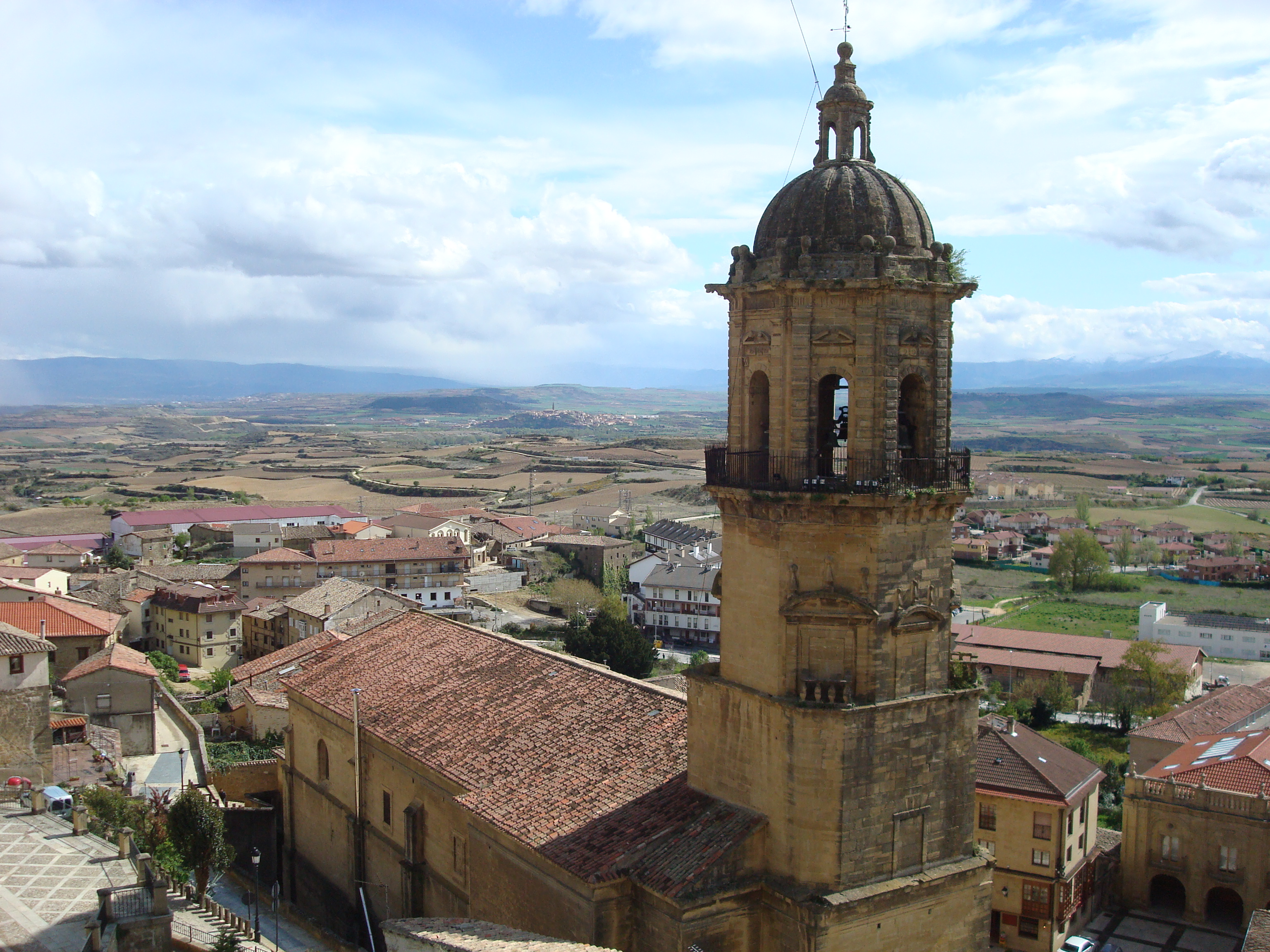 Labastida - 008